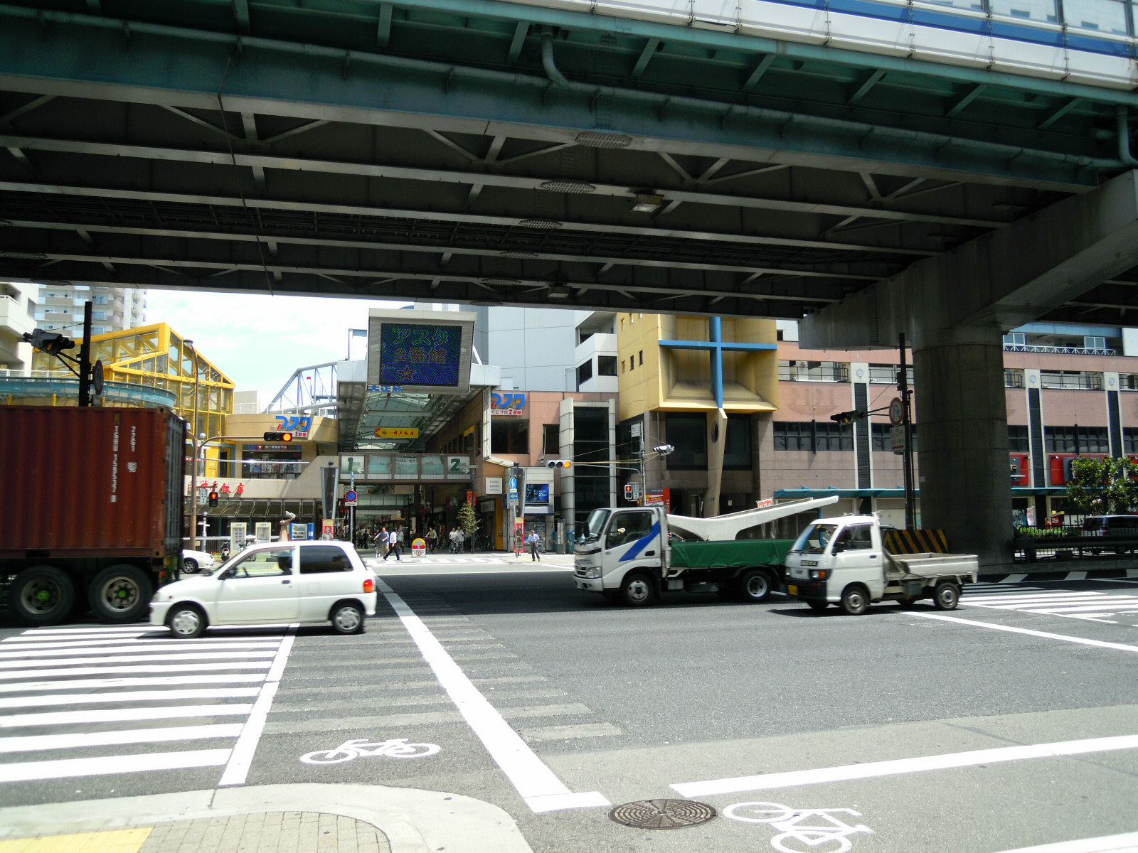 Shinnagata